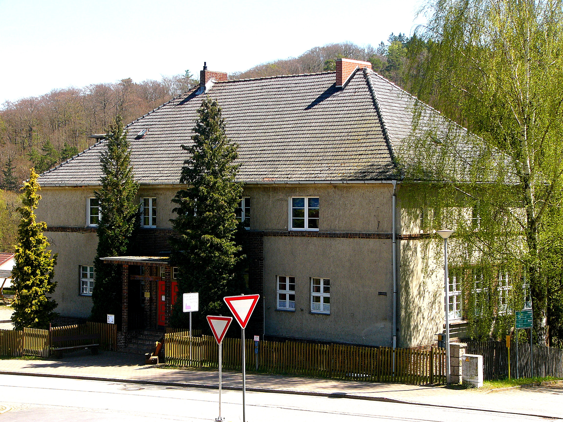 Schule; Putzbau mit Backsteinsockel als Gliederung, Kinderfigur und Datierung im Art-déco-Stil an der Nordostecke, 1930; Denkmalnr.: 094 84955.